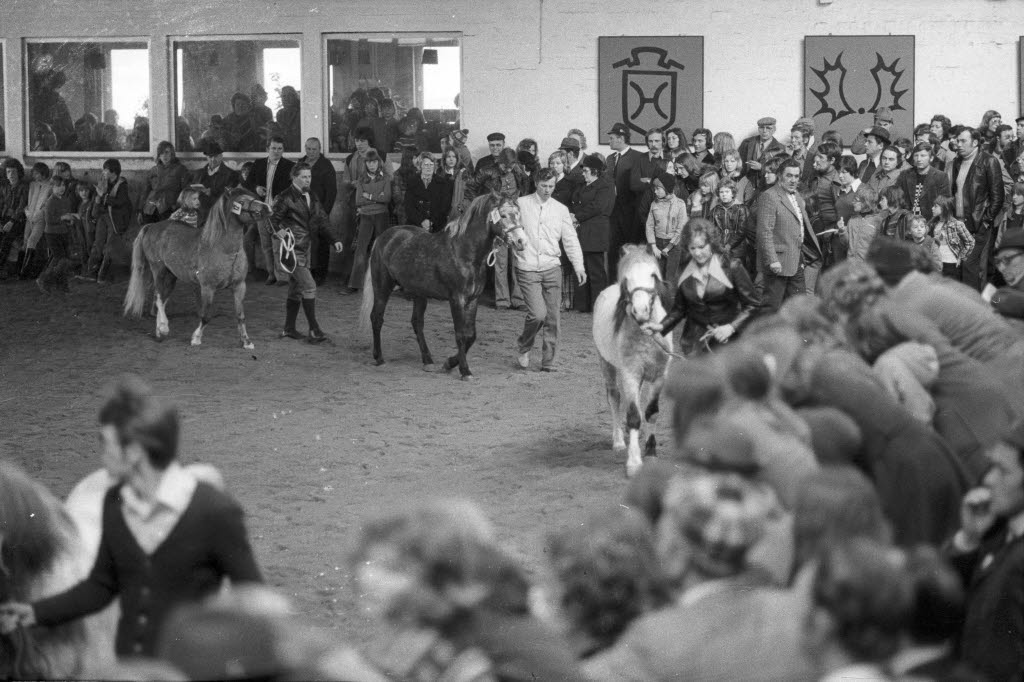 46 Hengste aus Schleswig-Holstein und Hamburg werden bei der ersten in Kiel veranstalteten Nachkörung einer Körkommission vorgestellt.